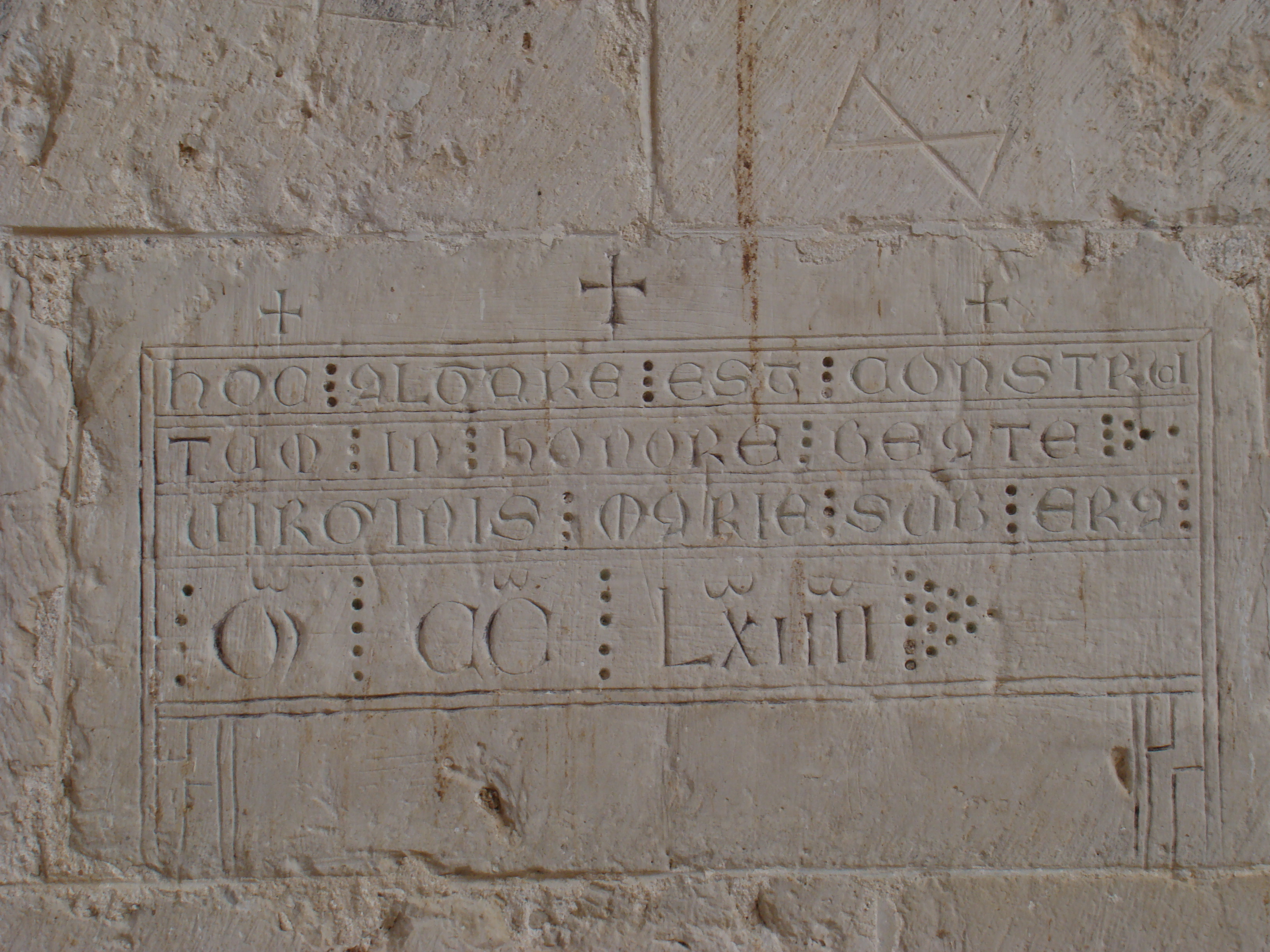 Monasterio de Palazuelos en la provincia de Valladolid. Lápida de consagración de la cabecera en 1226.